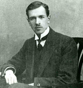 Эмиль Викентьевич Змачинский, русский, советский химик.